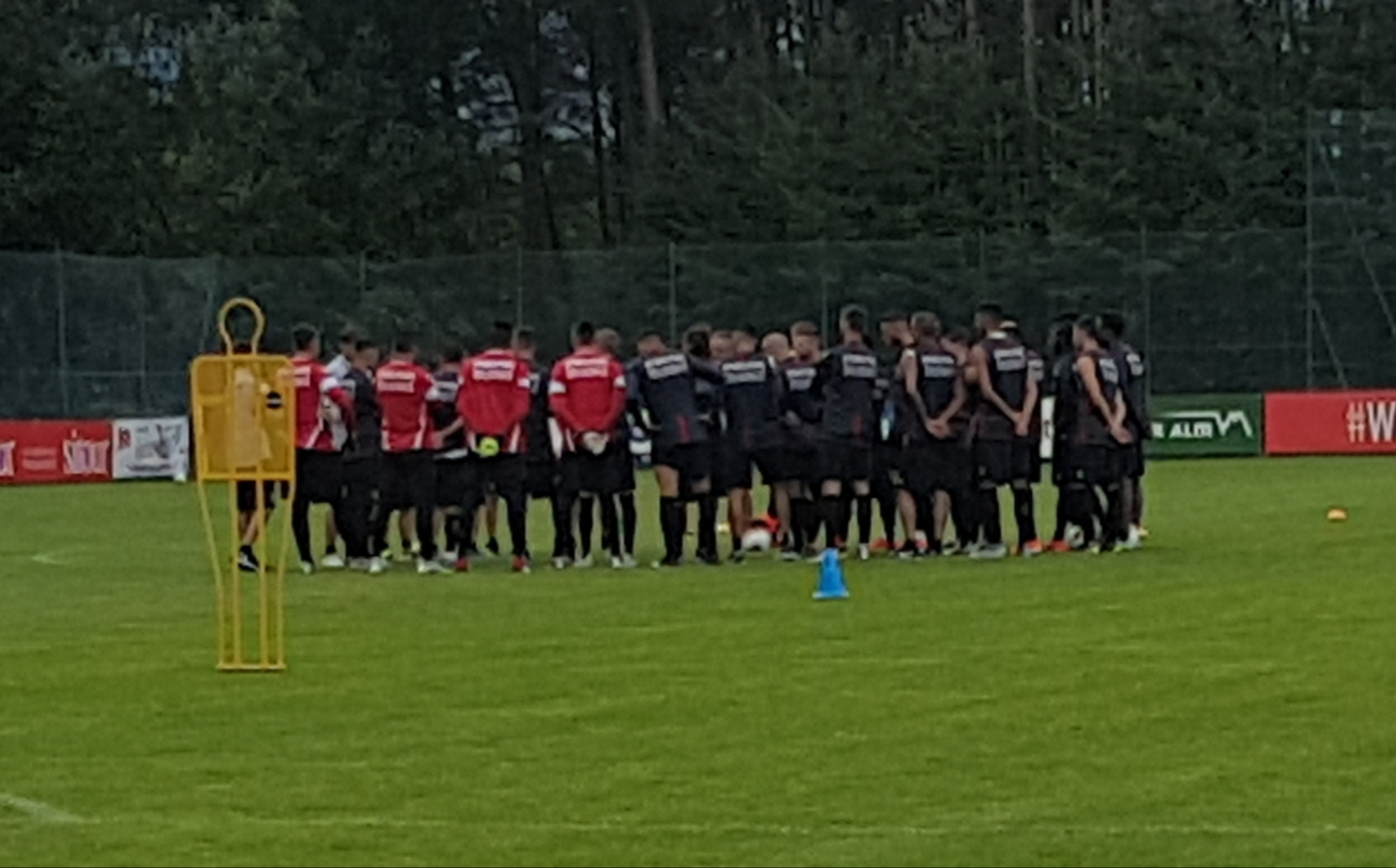 Il Bologna calcio in ritiro a Castelrotto (2019)